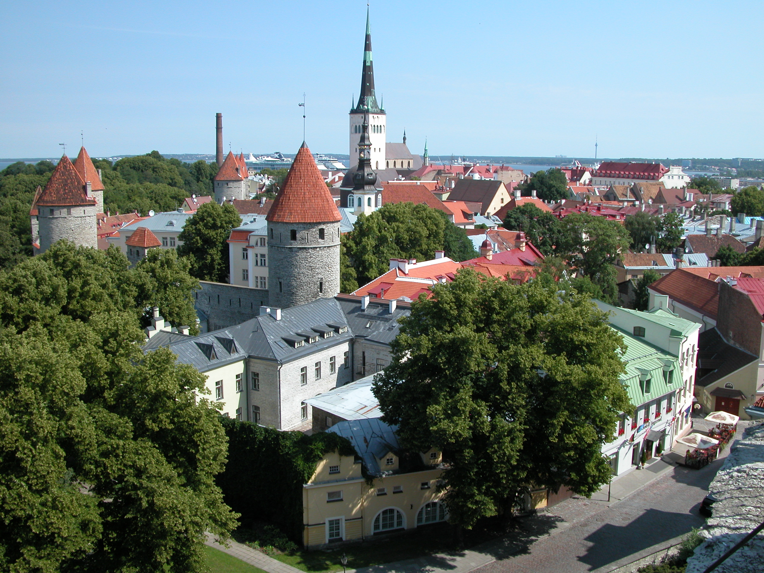 Tallinn: Blick über die Altstadt vom Domberg Richtung Nordosten. Im Hintergrund der Turm der Olaikirche, dahinter der Fähranleger.